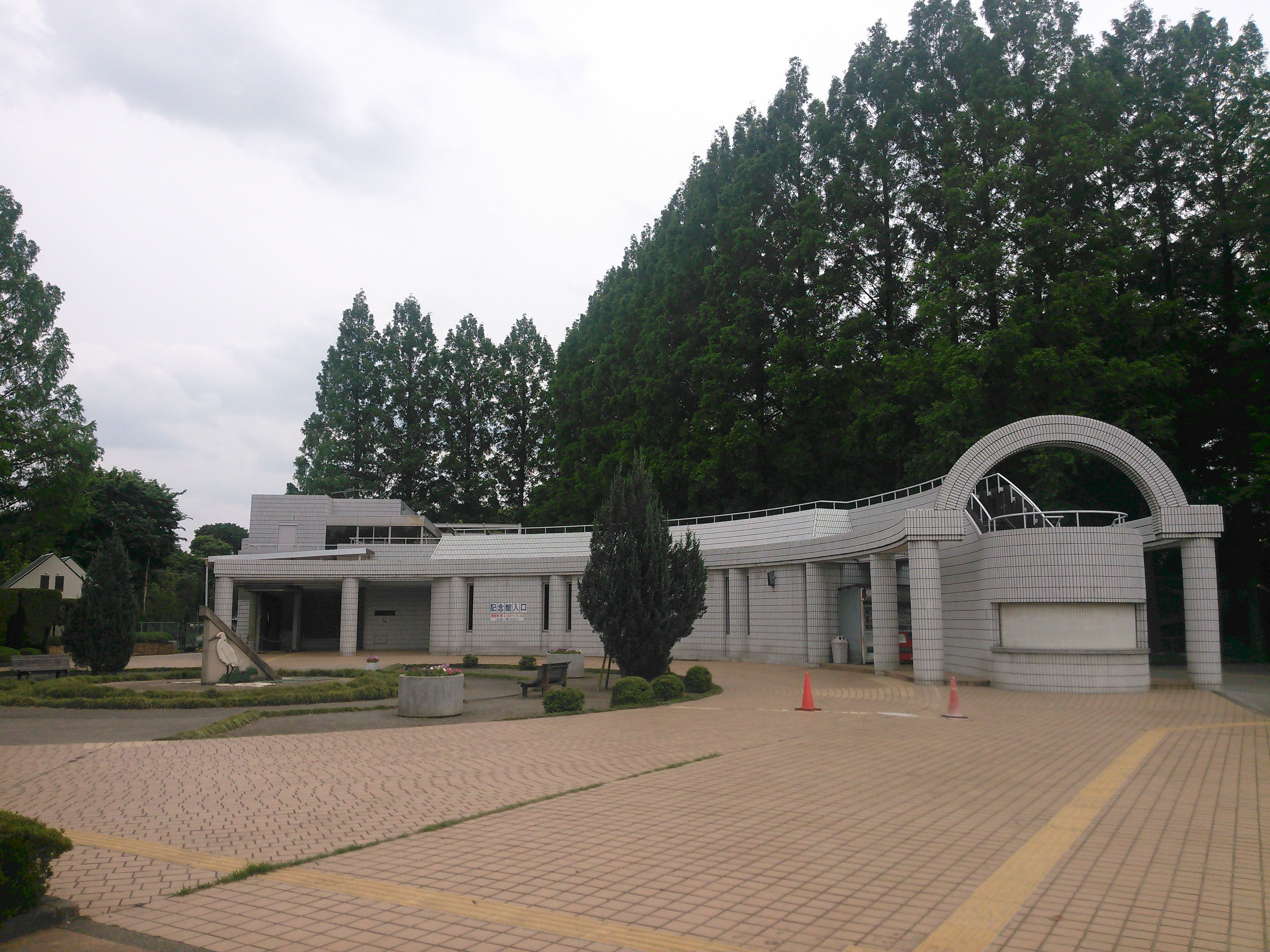 さいたま市緑区、さぎ山記念公園内のさぎ山記念館